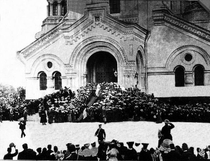 Посещение Государем Императором Николаем II кафедрального собора в Самаре 1 июля 1904 года